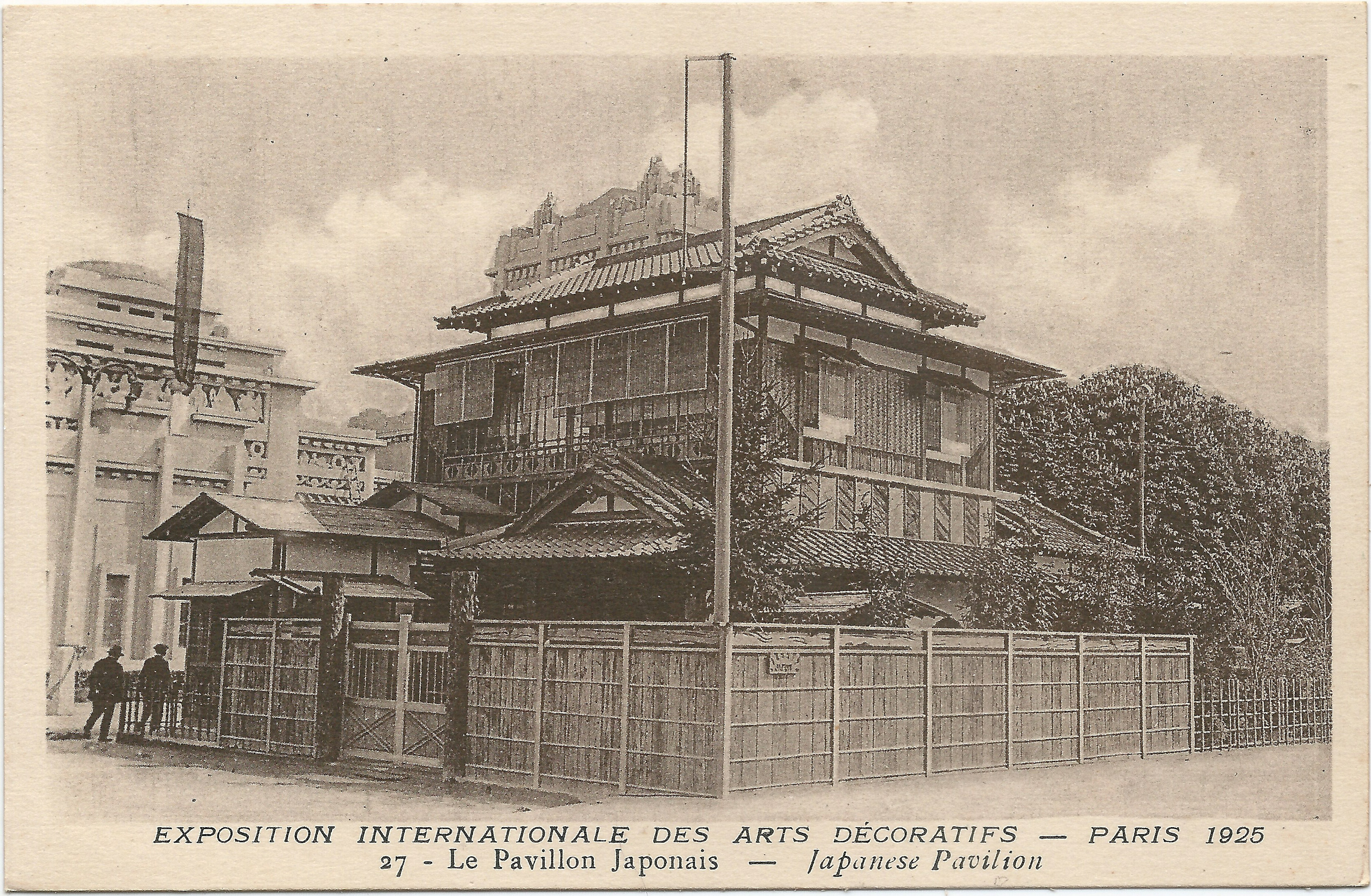 Exposition internationale des Arts décoratifs et industriels modernes de Paris en 1925